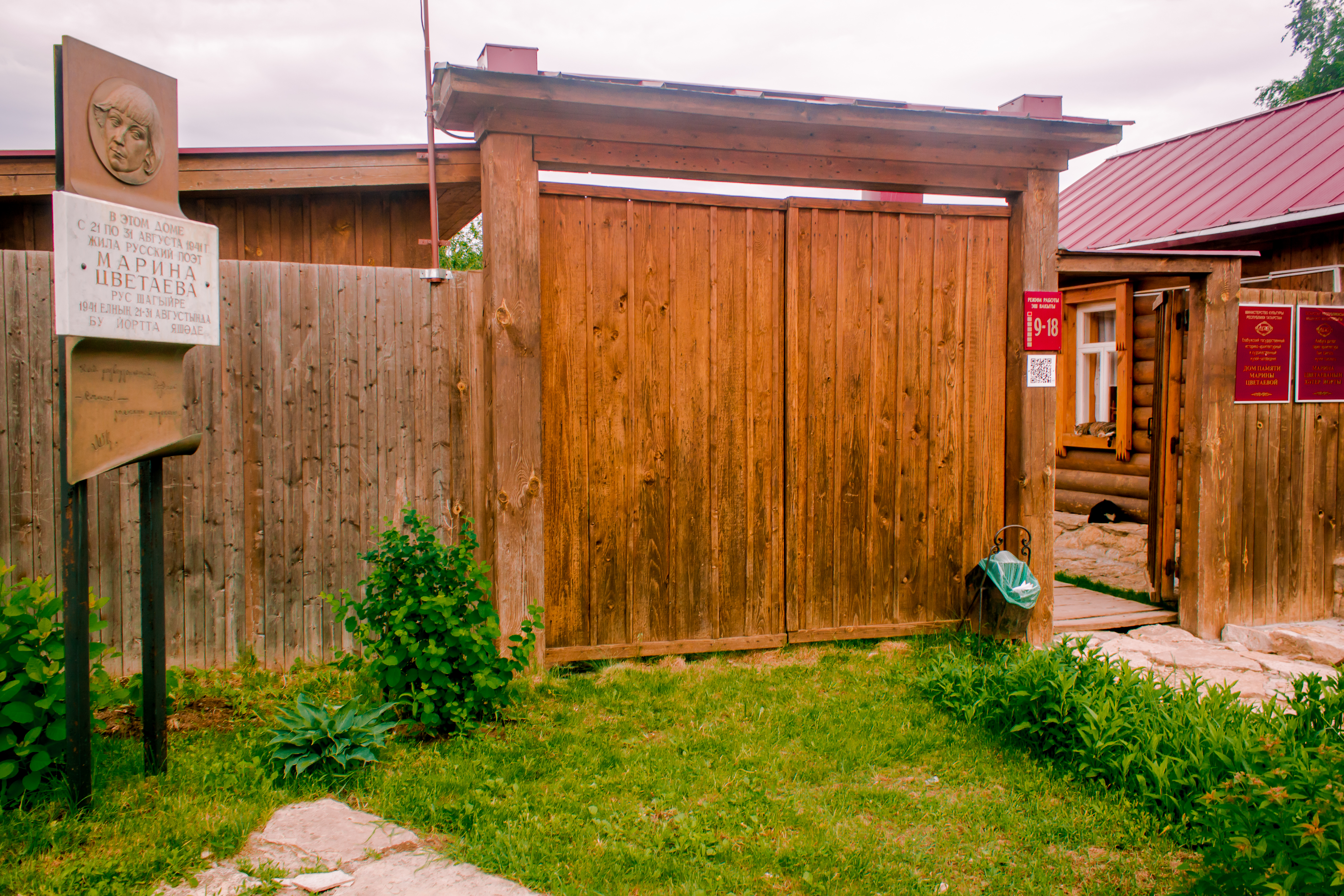 Дом, в котором жила поэтесса М.И. Цветаева: улица Малая Покровская, 20, Елабуга, Татарстан